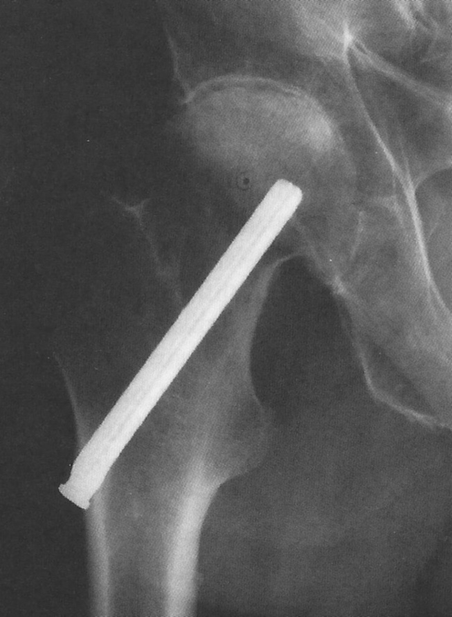 Dreilamellennagel im Femurhals eines 84-jährigen Mannes. 32 Jahre zuvor war eine Femurhalsfraktur mit dem Smith-Petersen-Nagel optimal versorgt worden. Wegen der Koxarthrose wurde der Nagel entfernt und eine Hüftendoprothese (S-ROM-Schaft) implantiert.